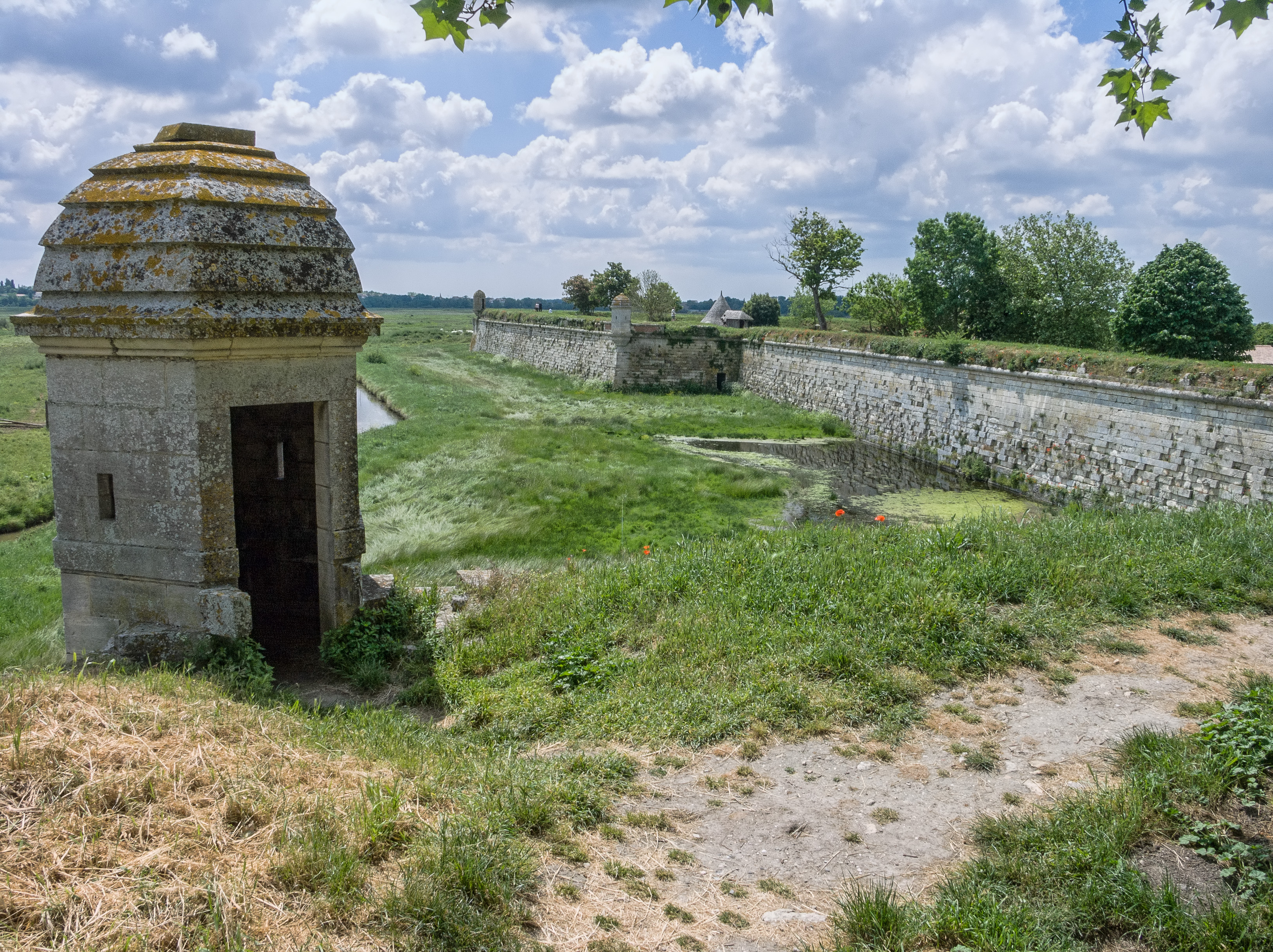 Remparts de la citadelle de Brouage